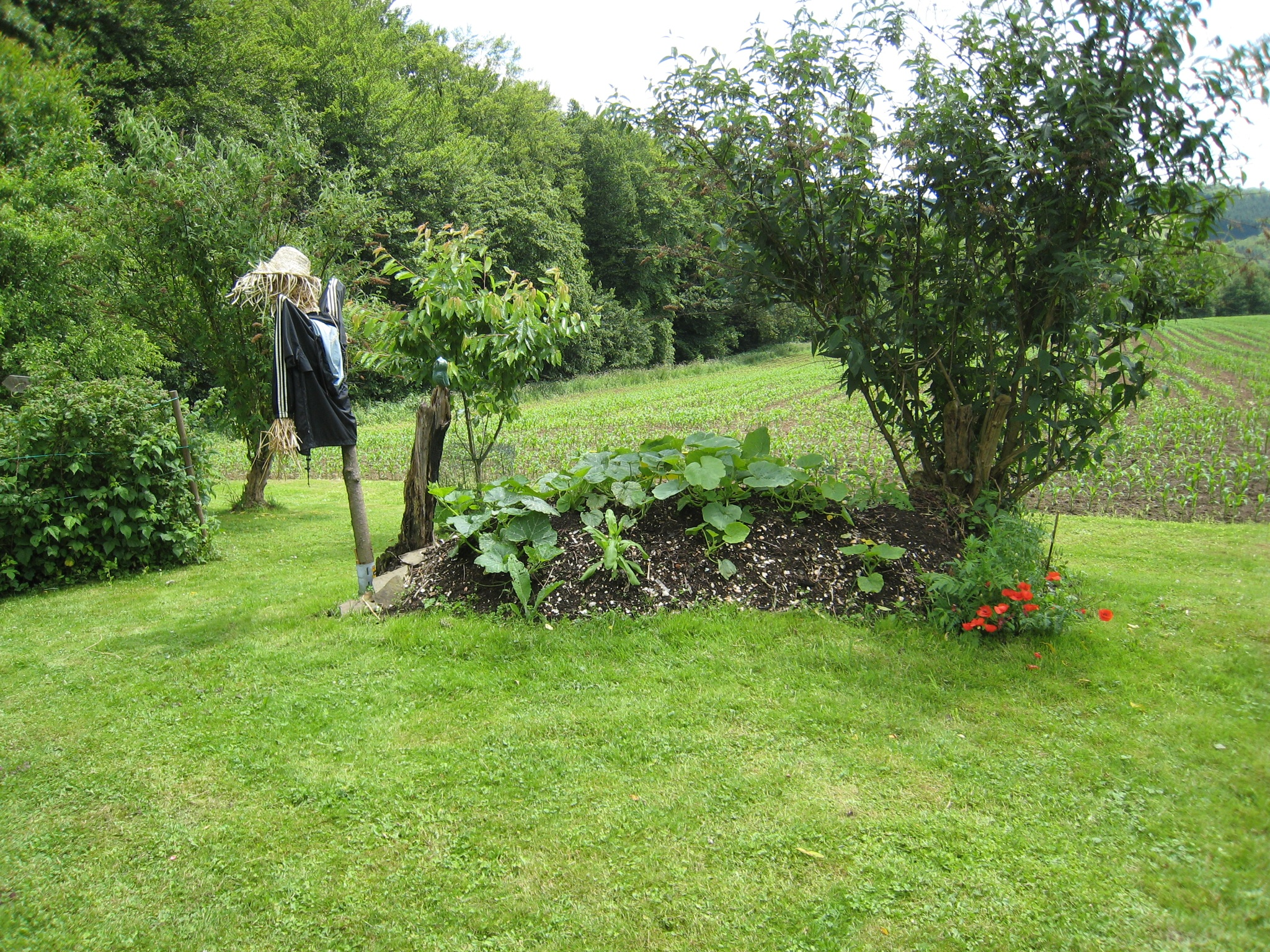 Vogelscheuche am Hügelbeet im Garten der Familie Röger in Halzemich (Overath-Marialinden)